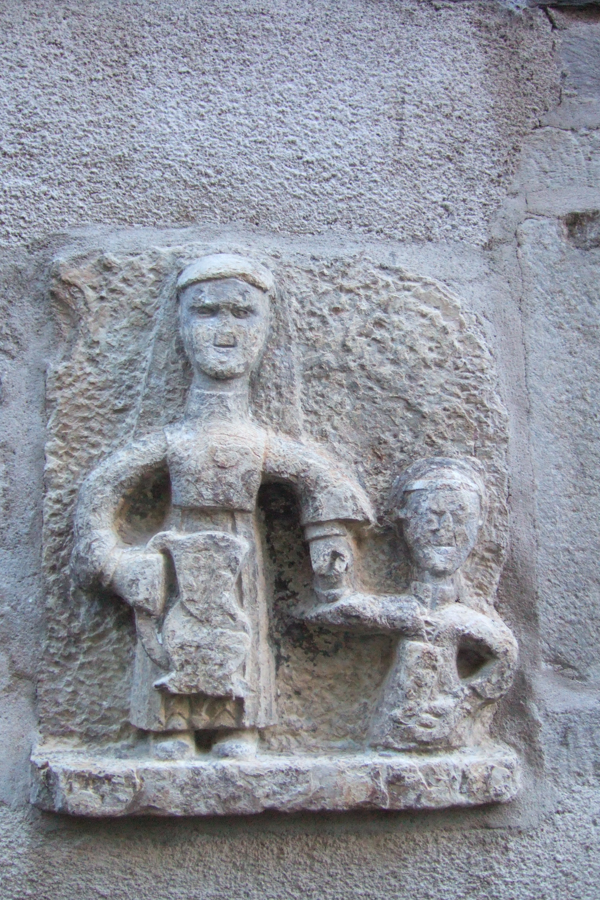 sculpture rue saint vital Sauveterre-de-Rouergue